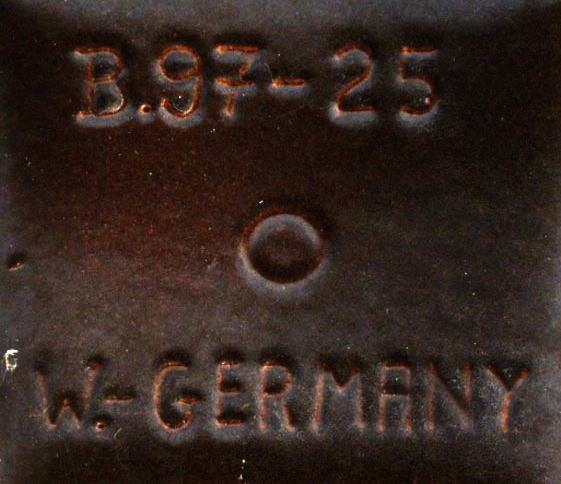 Signature en relief, Manufacture Carstens, Allemagne